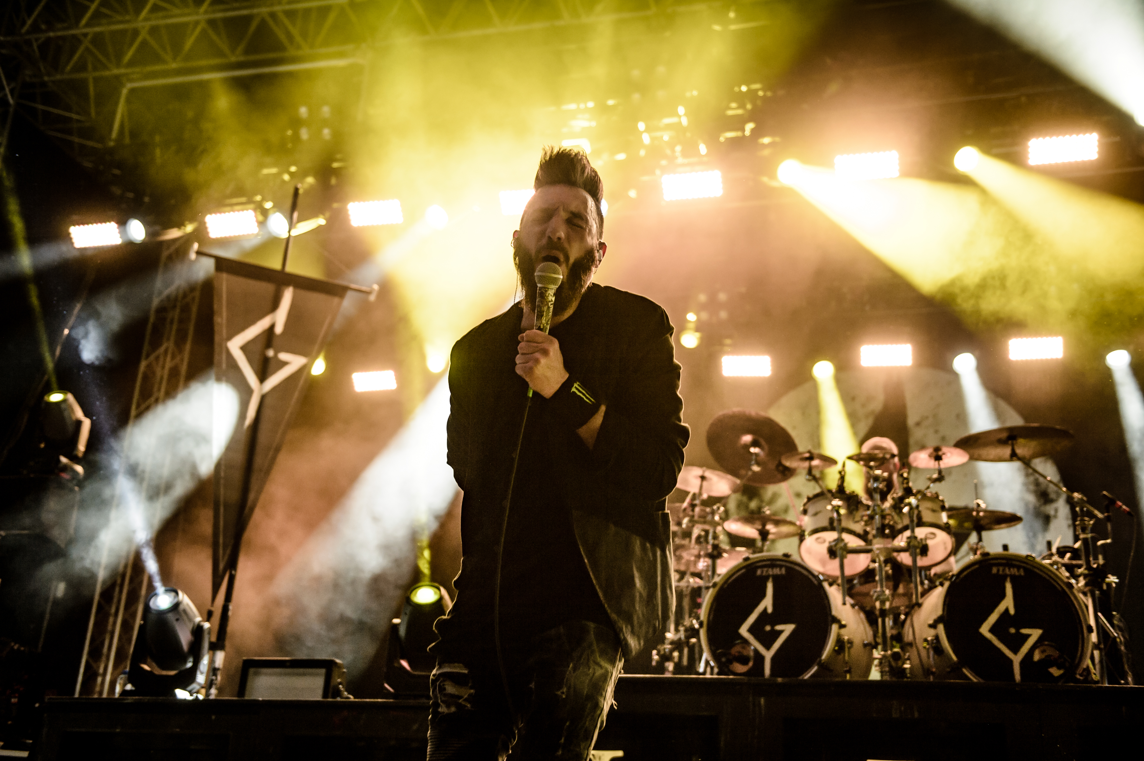 'Impericon Festival 2017; Oberhausen Turbinenhalle': 'Caliban'